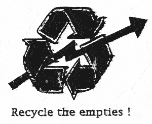 Recycle squat simbol.